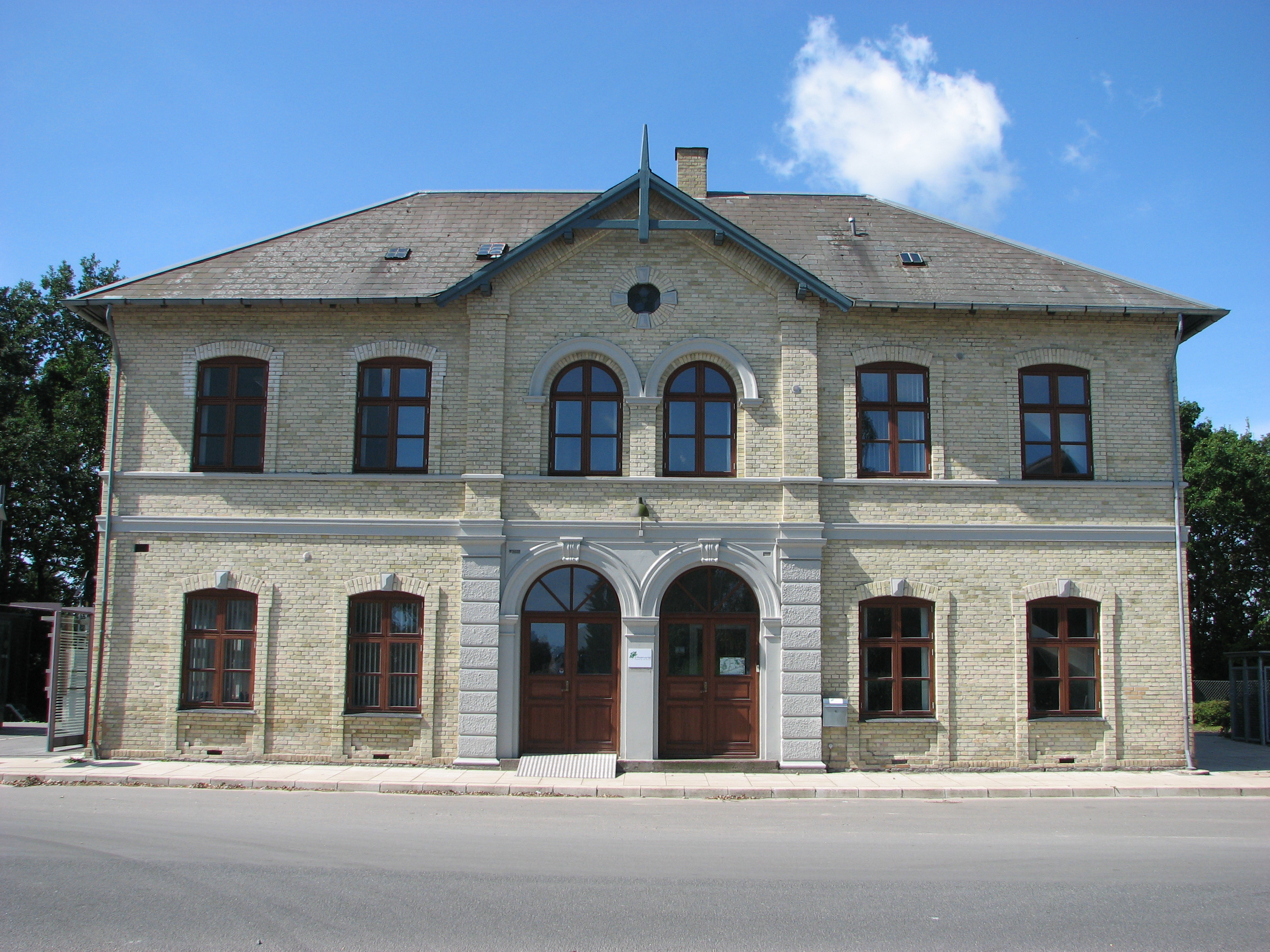 The railroad station in Kværndrup, Funen, Denmark